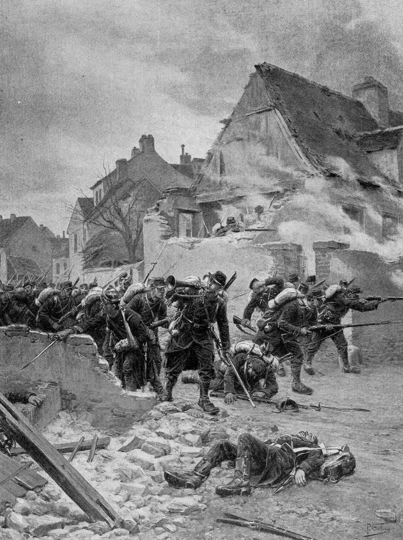 Combat dans un village, tableau de Grolleron montrant des fantassins français pénétrant dans un village pendant la guerre franco-allemande de 1870-1871